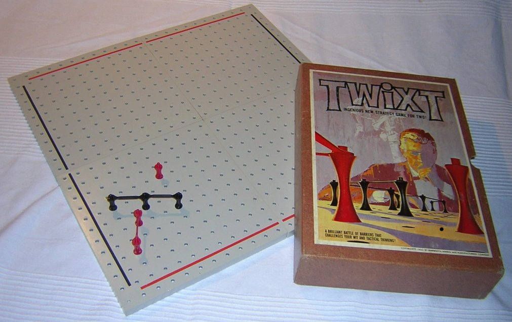 Brettspiel Twixt in der Standardausgabe von 3M